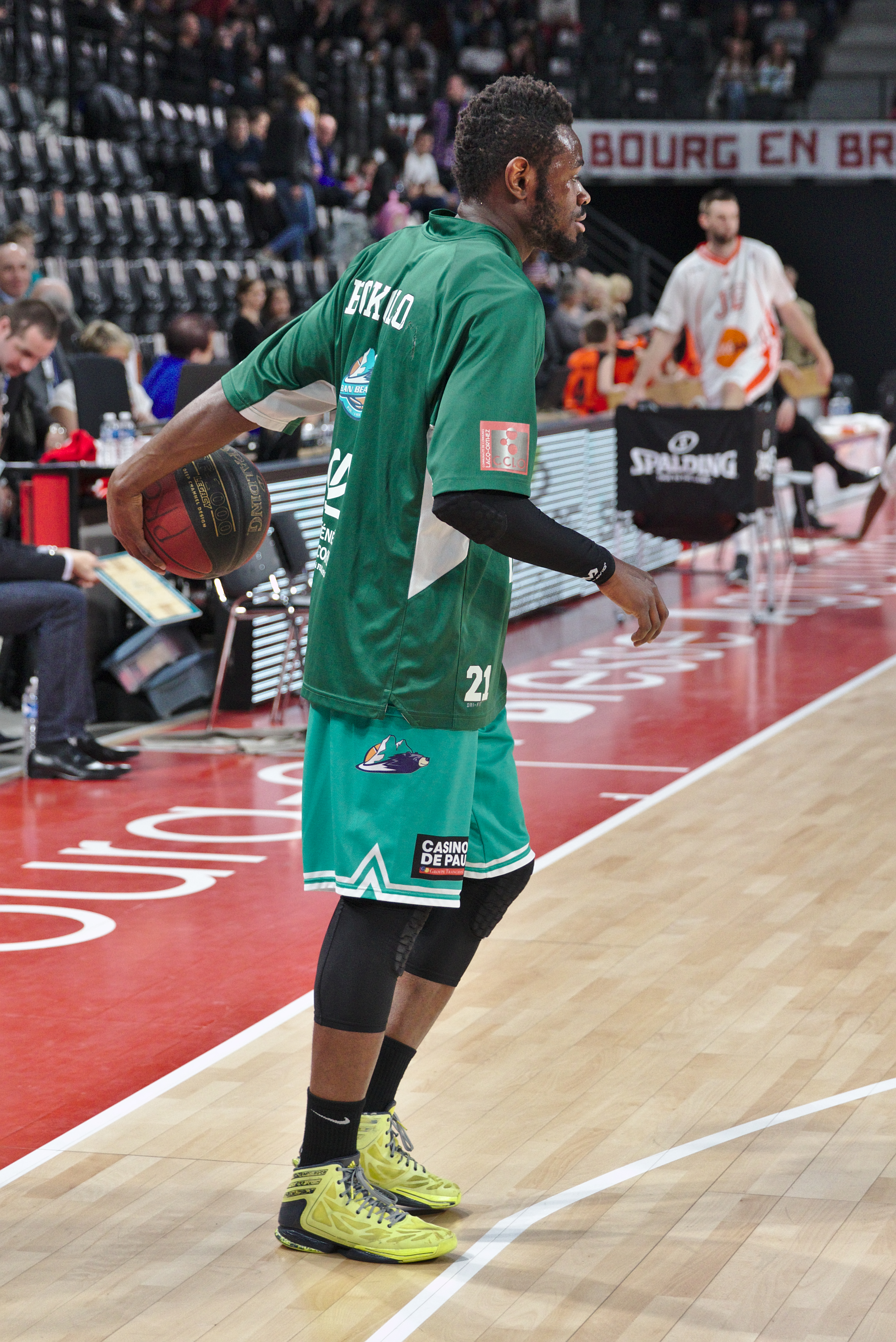 JLB-EB - 20150328 - Yannick Bokolo